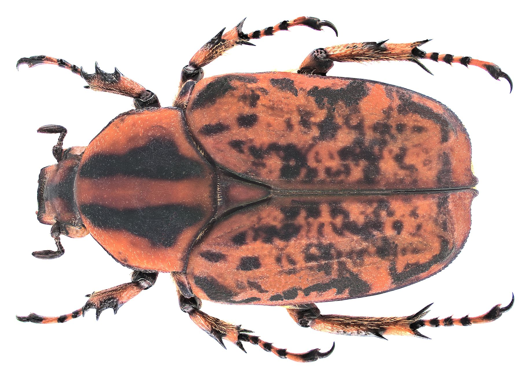 Familie: Scarabaeidae Groesse: 21 mm Verbreitung: Kenia, Zaire, Uganda Fundort: Kenia, Nandi-Prov., Kipsamoite, 1900 m leg. E.Eitschberger, 1997; det. U.Schmidt, 2005 Photo: U.Schmidt, 2005